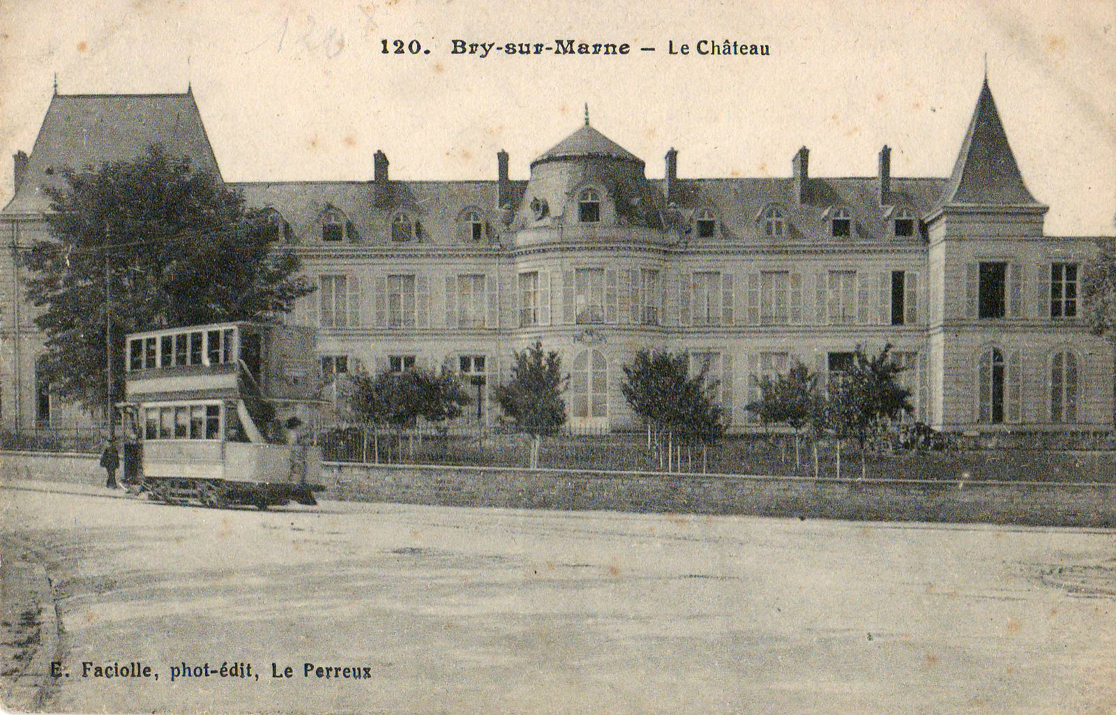 Carte postale ancienne éditée par E. Faciolle, photographe-éditeur au Perreux, n°120 : BRY-SUR-MARNE - Le Château